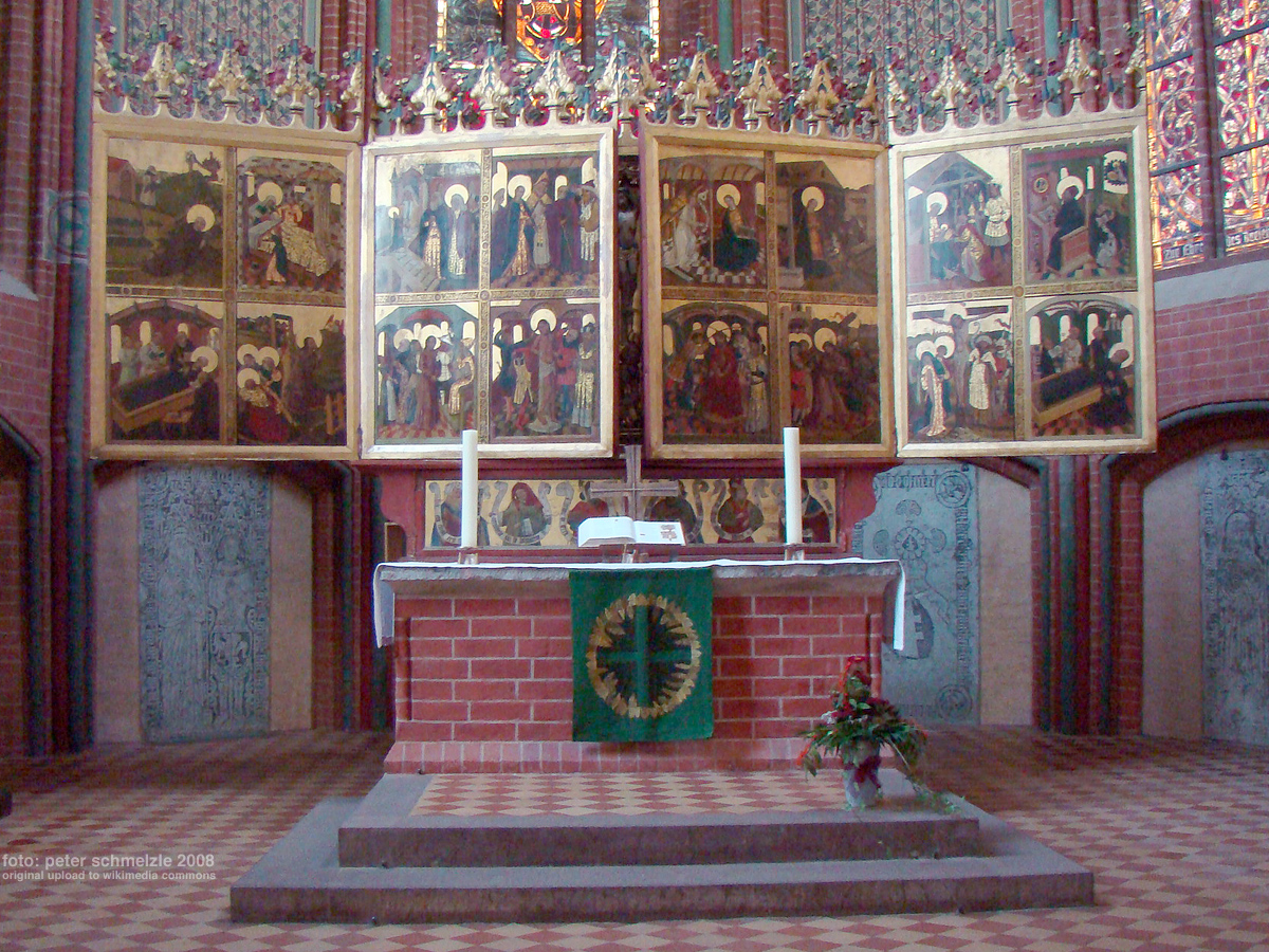 Ausstattungdetail der Klosterkirche Heilig Kreuz in Rostock